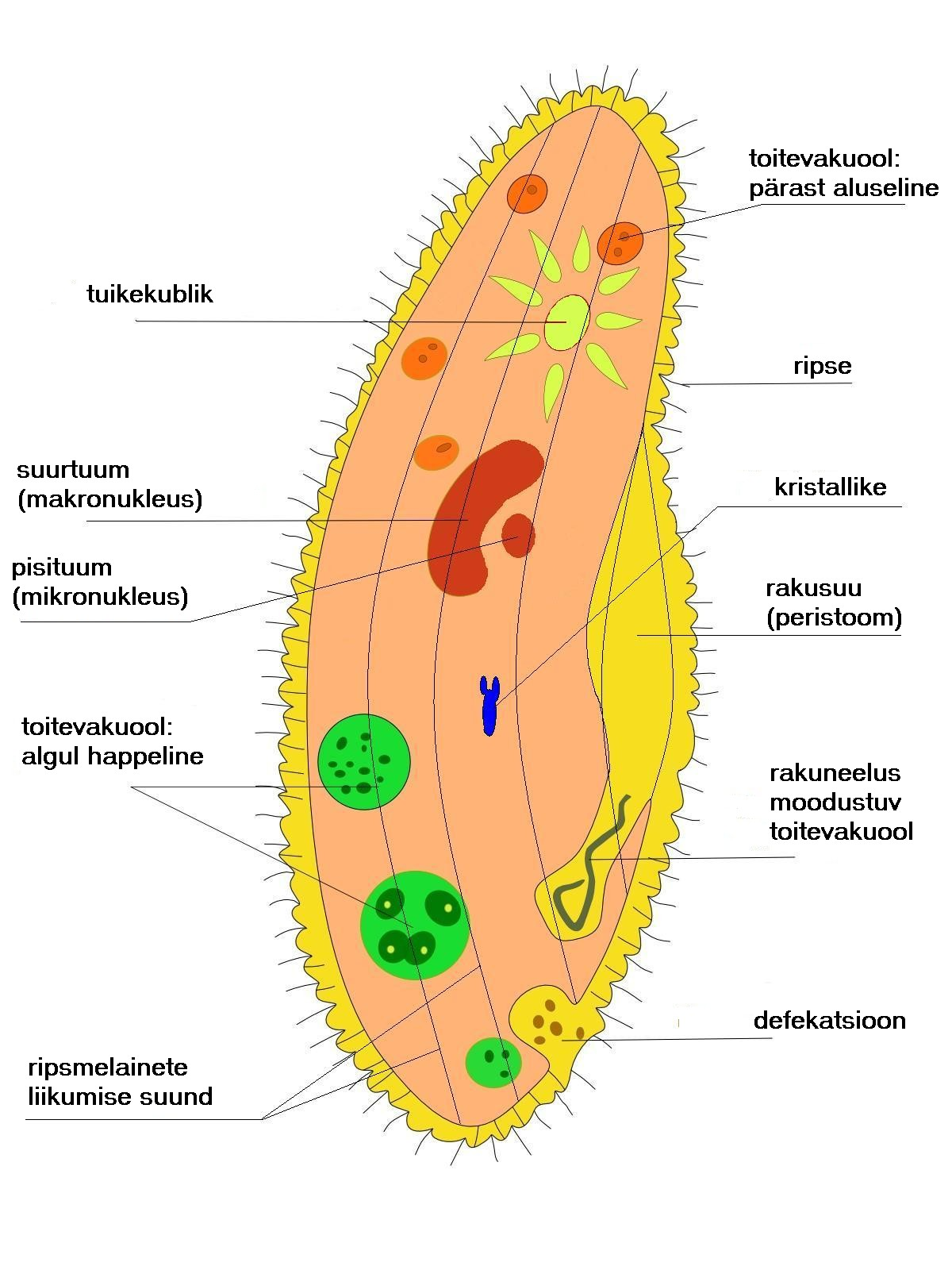 Kinglooma toitumine